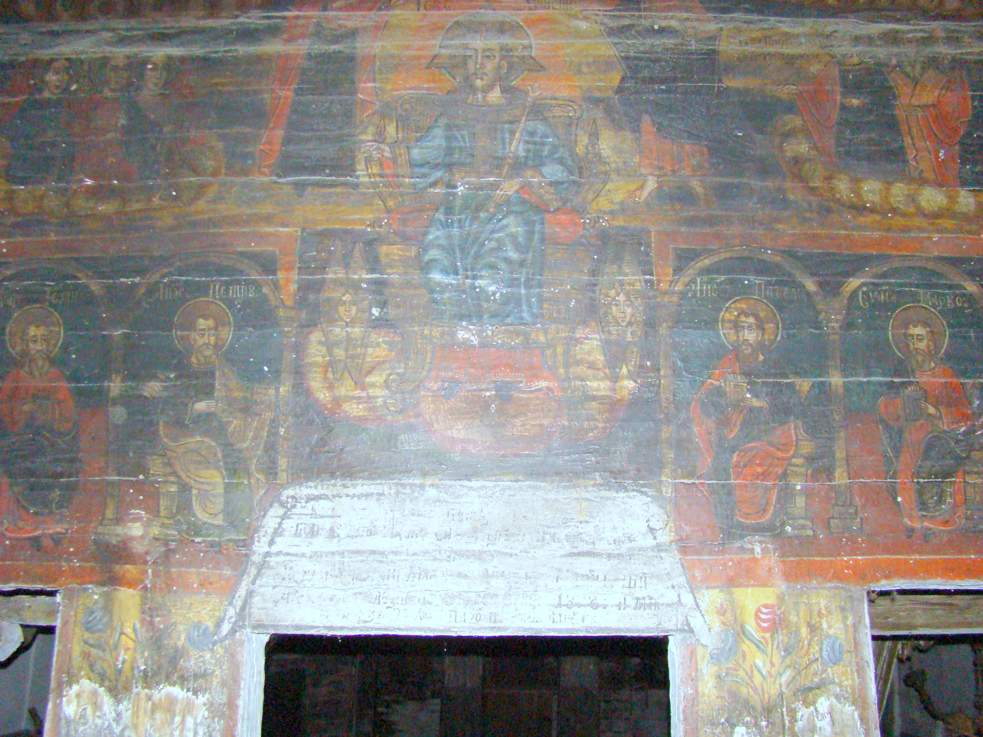 Biserica de lemn „Cuvioasa Paraschiva”